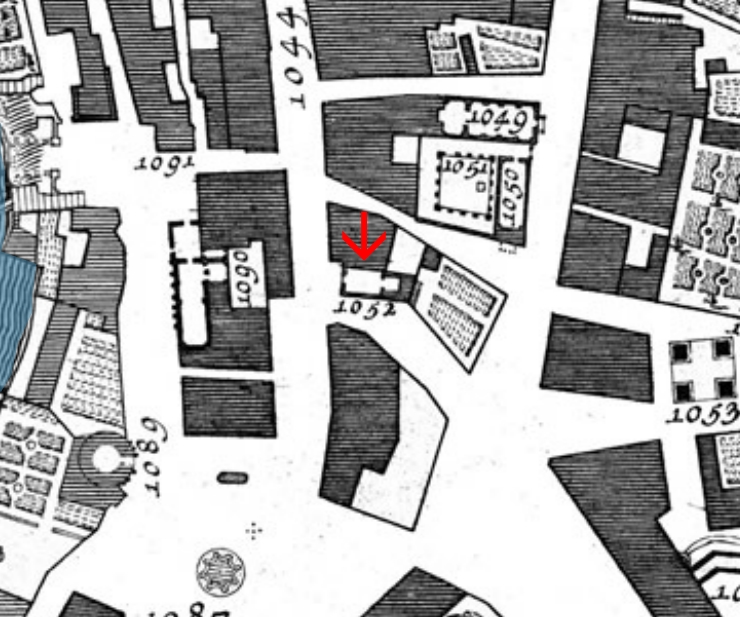 Pianta di Nolli